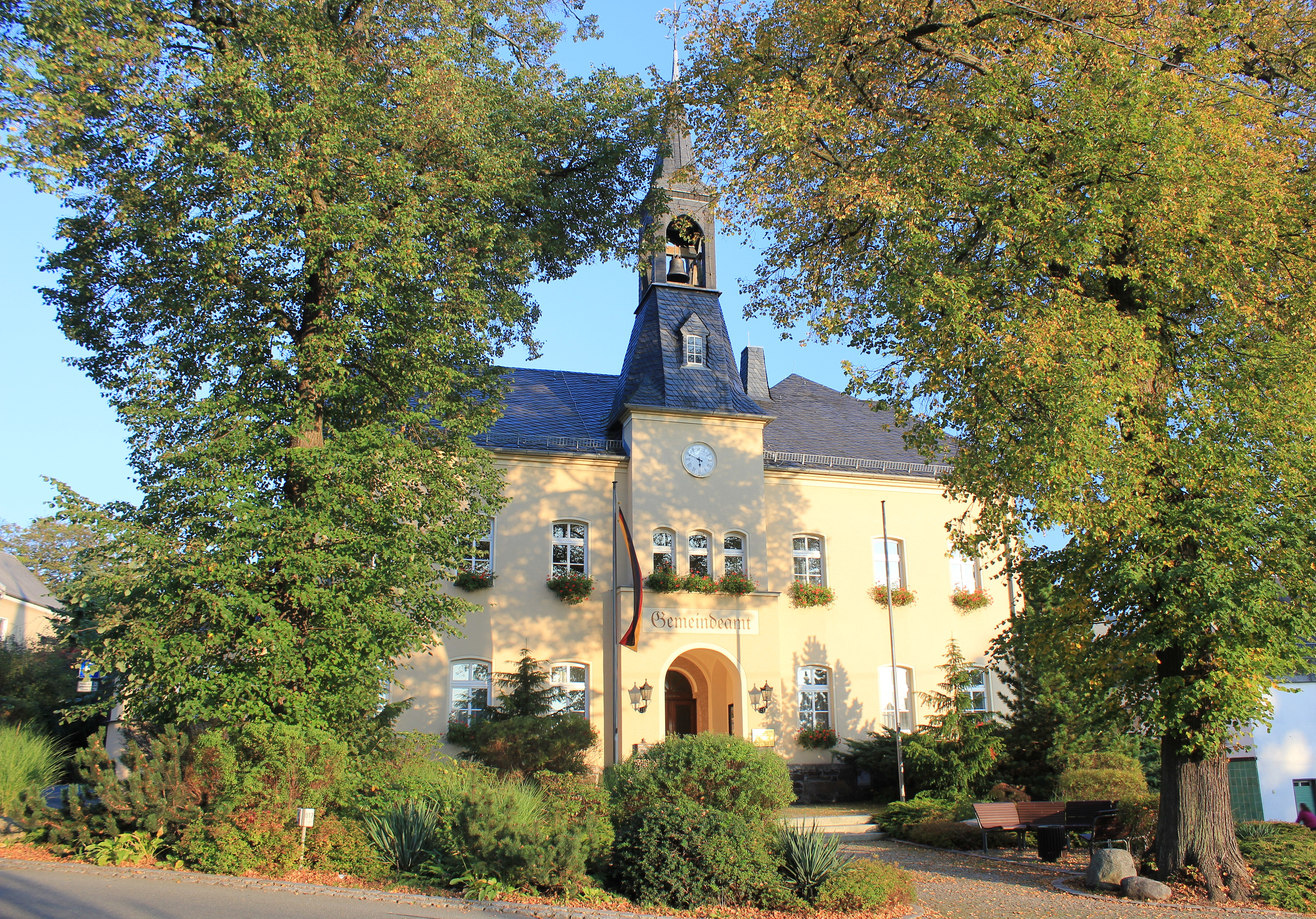 Rödlitzer Strasse, 09394 Hohndorf. Sachsen, Erzgebirgskreis..